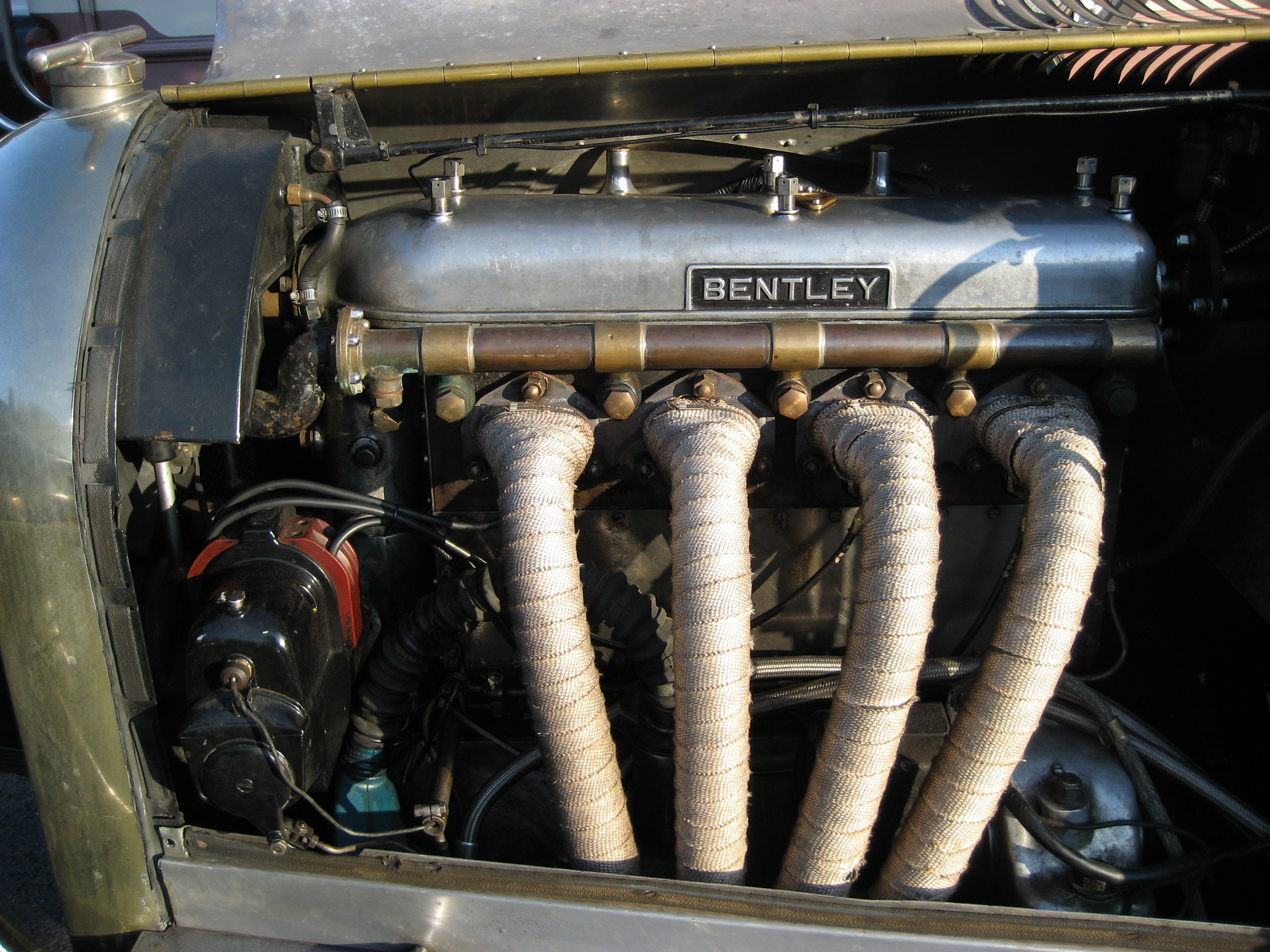 Bentley 4½ Litre engine